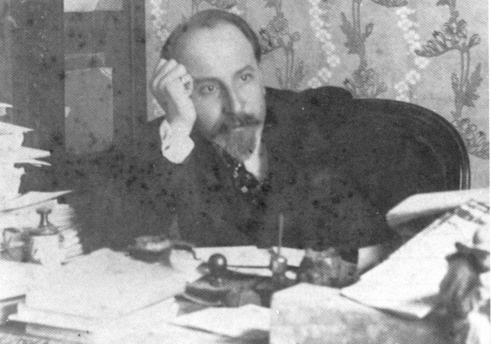 Luigi Pirandello a quarant’anni circa a Roma.